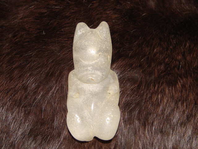 中文（台灣）: 器別：生坑 紋飾：立體 泌色：無 朝代：紅山文化 礦物學名：琉璃﹝二氧化硅﹞ 紅山文化-年代約3500-5000年。 紅山文化-小件配飾品.有數百種的造形.玉c形龍.猪龍.玉梟.玉鷹.面具三孔器.異獸.玉蟬複合體.太陽神等。 此器質化晶變‧次晶增生未受人工拋光打磨、 保留原有土咬風化的魚鱗狀的﹝六角柱狀晶體﹞ 、生坑未盤玩，三面立體﹝肖生﹞造形特別‧曲線流暢.雕工傳神‧創意佳。 ﹝藝術品﹞